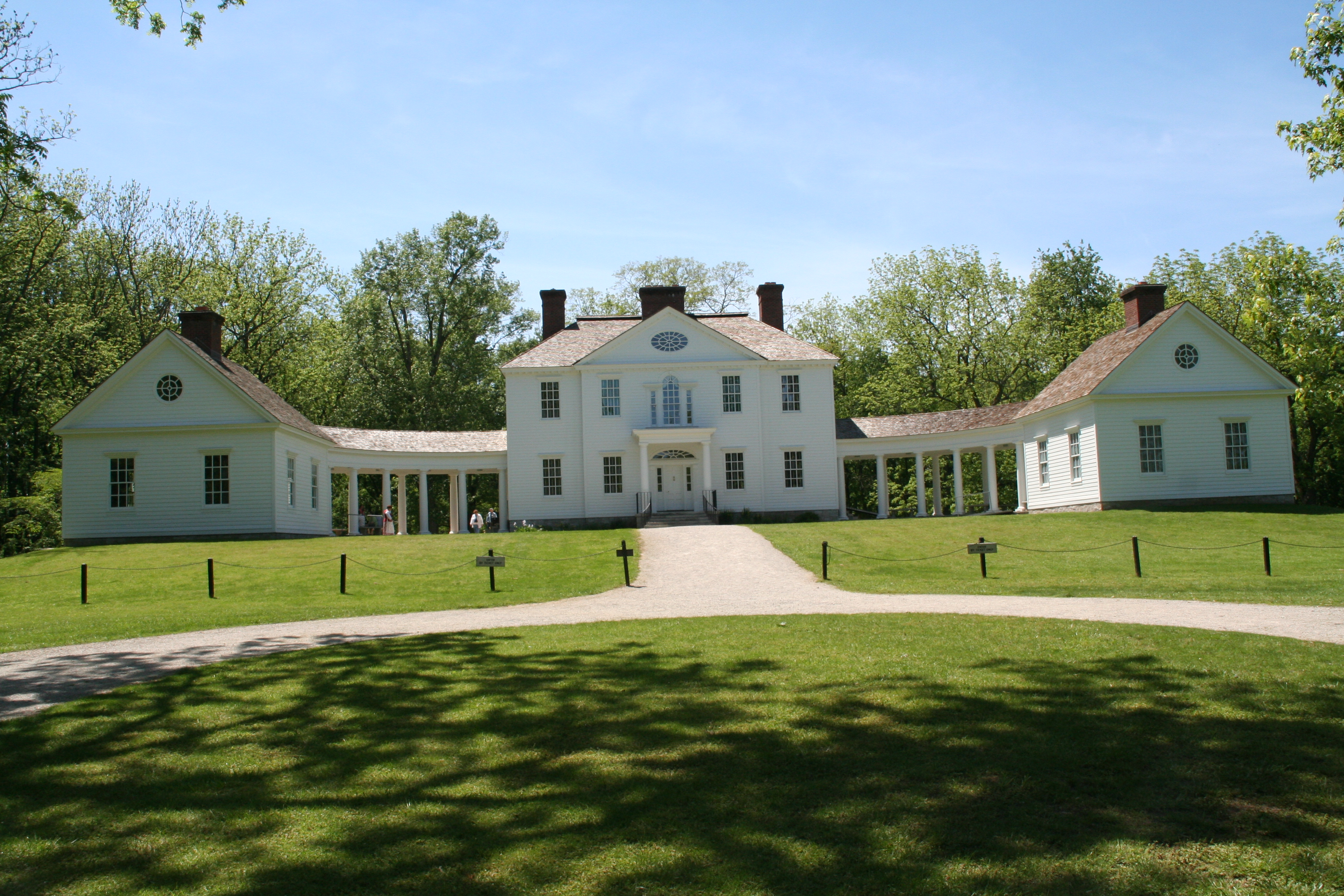 Rebuilt Blennerhasset Mansion in Blennerhassett Island Historic State Park